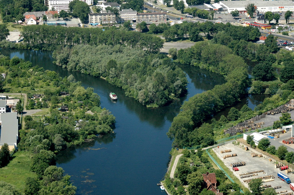 Widok z lotu ptaka na Wyspę Wisielca w Bydgoszczy.